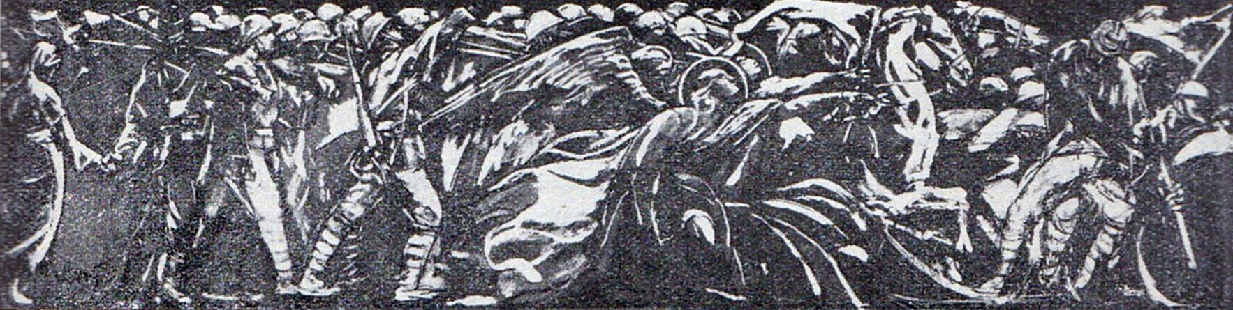 Pentru Patrie